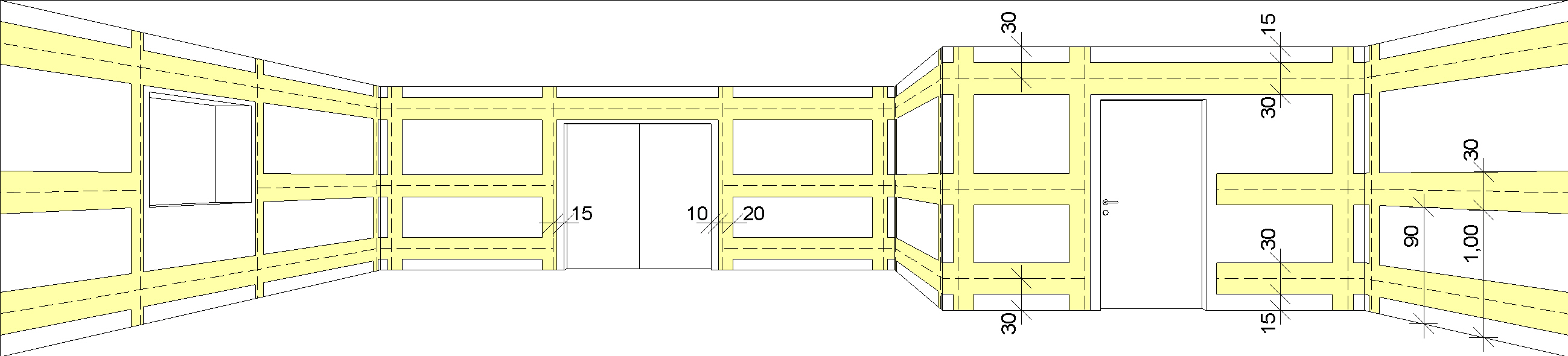 Verlegezonen Räume mit Arbeitsfläche